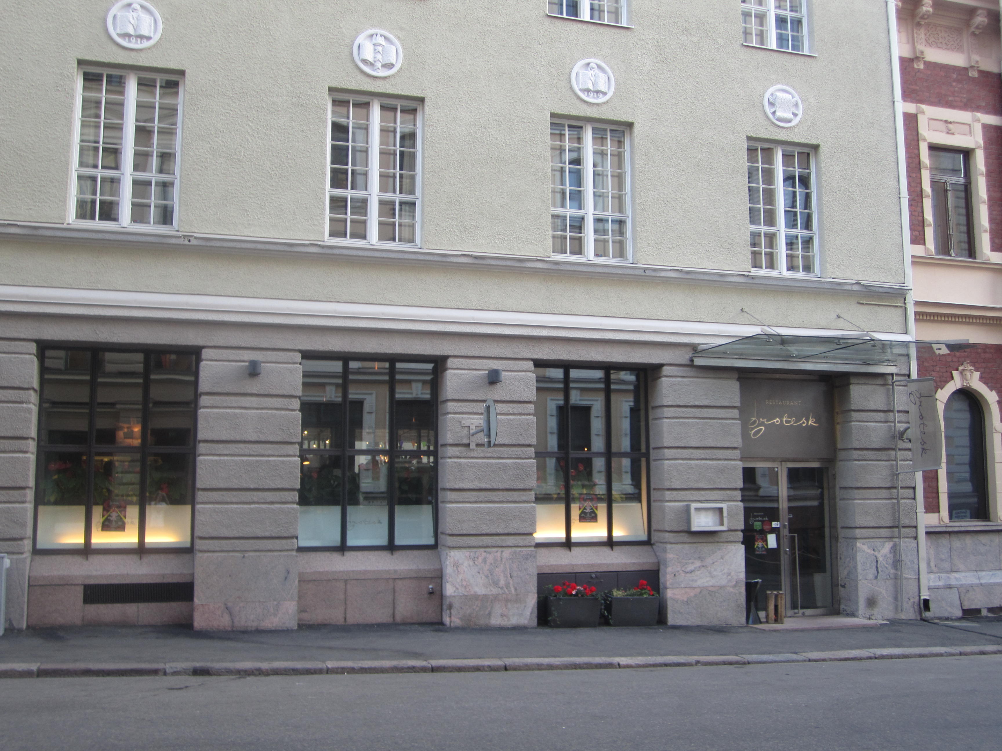 Ravintola Grotesk Helsingin Kaartinkaupungissa.